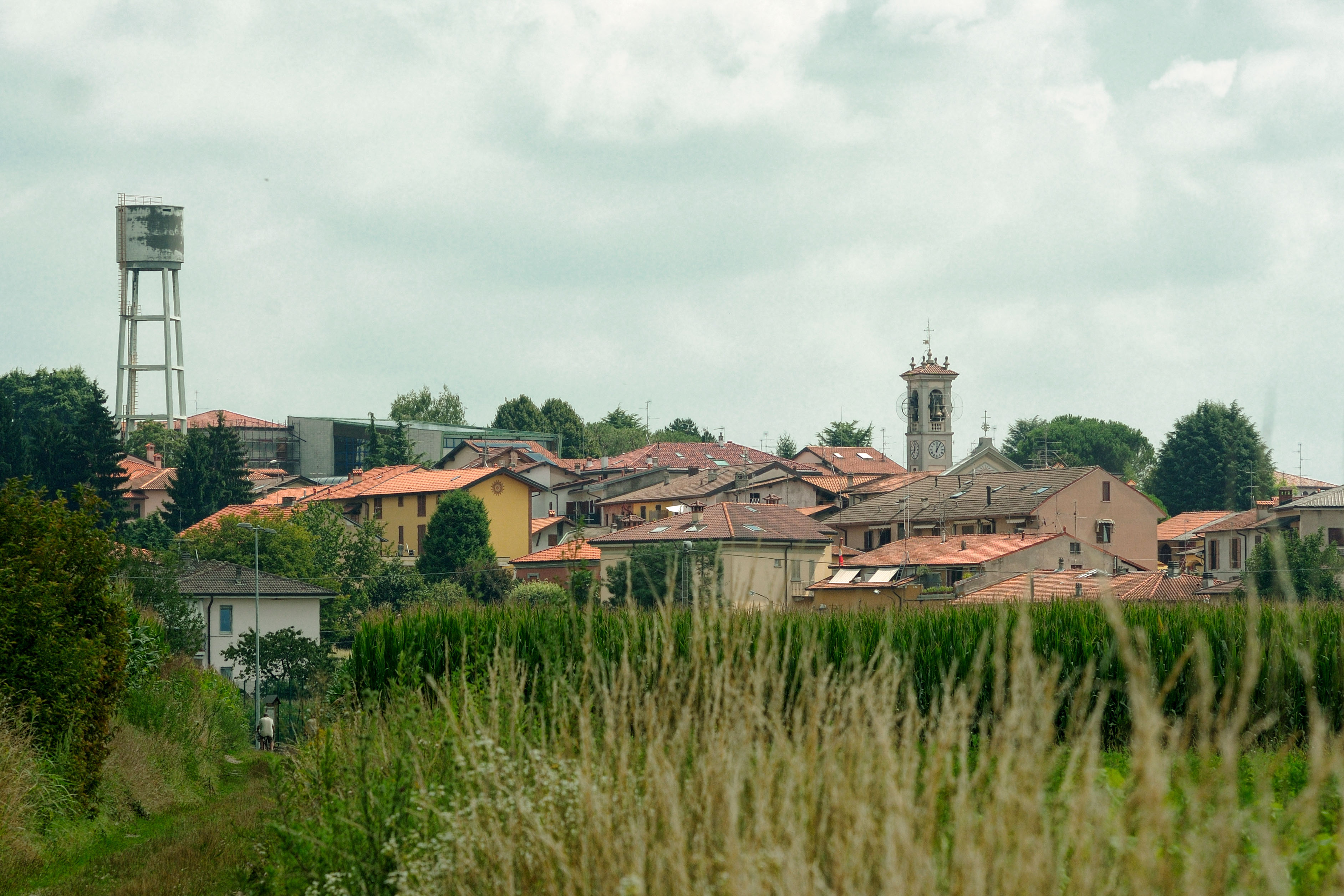 Veniano Inferiore visto dal limitare del bosco del Parco Pineta; si nota la chiesa di Sant'Antonio Abate.